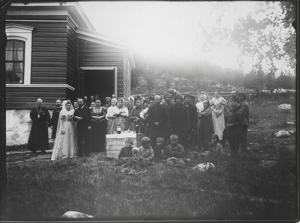 Wessel, Ellisif Rannveig Gruppebilde fra bryllup i Boris Gleb. Til venstre i bildet står presten i Tchecoldin, bruden er hans datter. Til høyre i bildet er Andreas Wessel. ca. 1897 Informasjon fra Bok av Elisabeth Johansen, Liv Marie Austrem, Gro Røde: Ellisif Wessel, Du ber om mit fotografi, Orkana forlag 2007 NMFF.002126